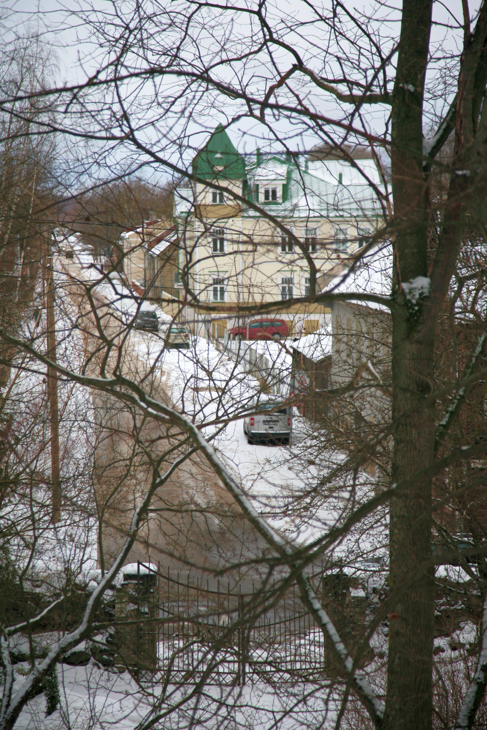 Vaade Oa tänavale Supilinnas Tartu botaanikaaiast, 3. veebruar 2013.